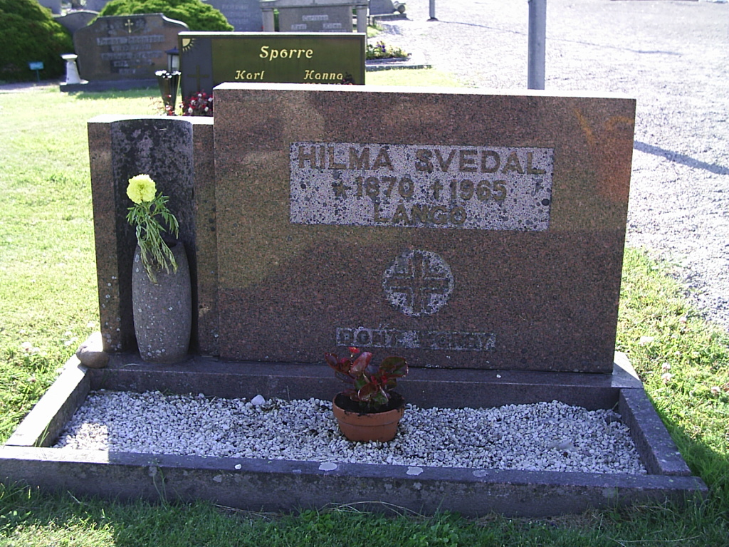 Hilma Swedahls grav på Skee kyrkogård. Fotograf:Tubaist